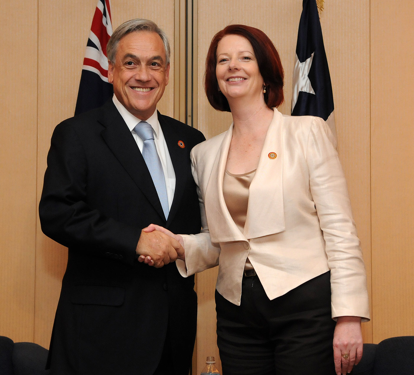 Reunión con Primera Minsitra de Australia.